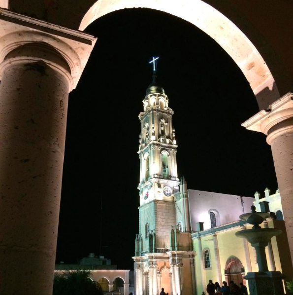 Parroquia de San Miguel Arcángel en Uriangato, Gto.